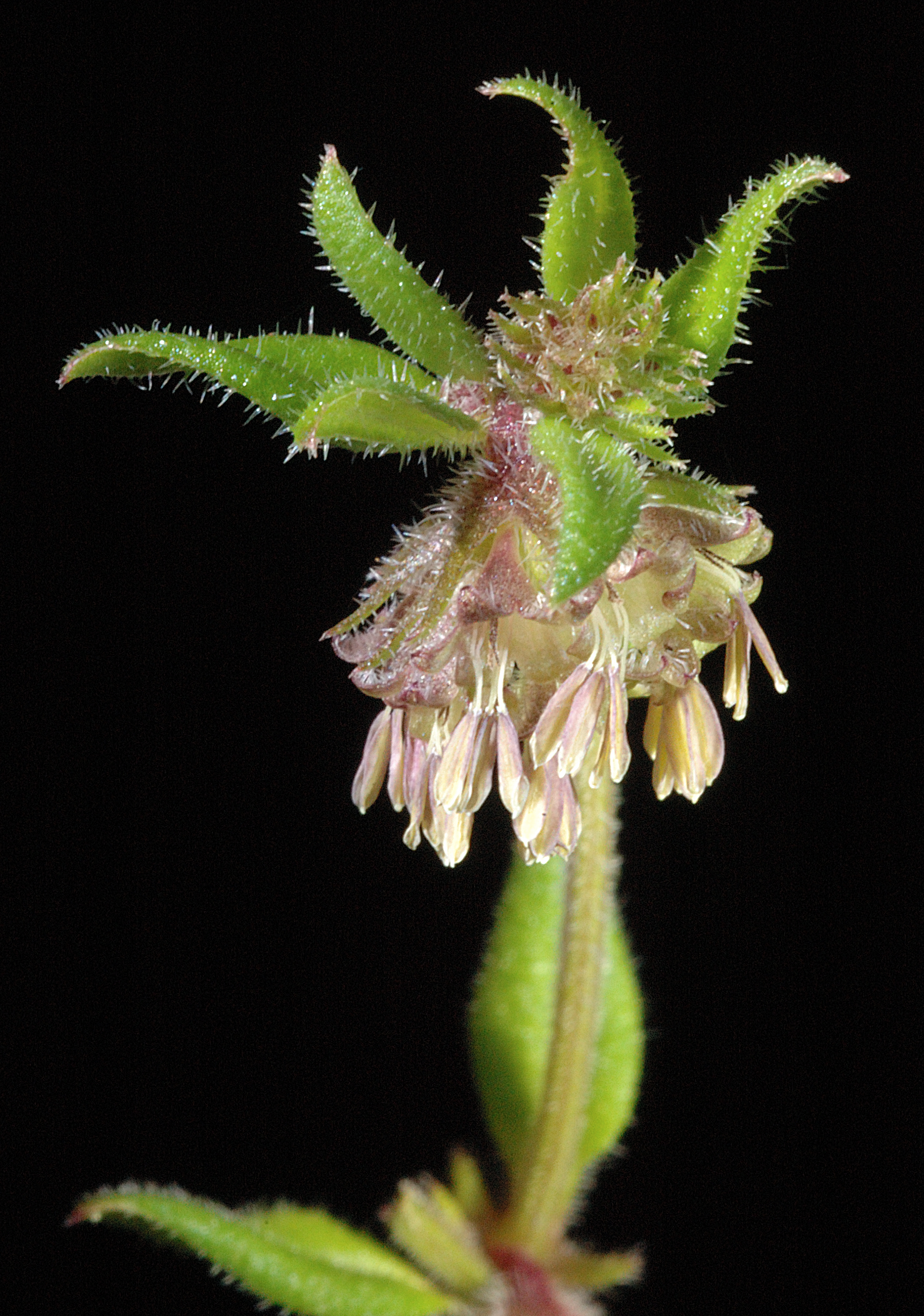 KRT3077